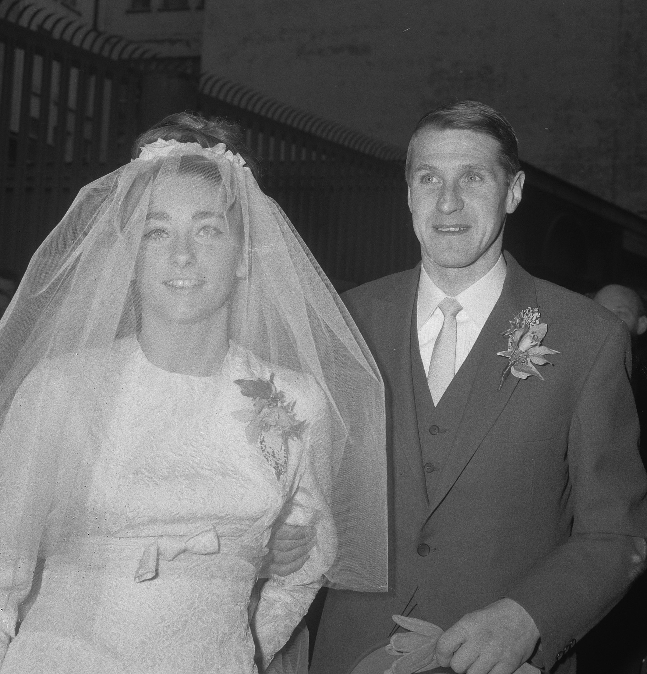 Huwelijk Peter Post met Loek Kalis , in kapel in de Warmoesstraat